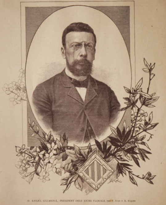 La Ilustració Catalana, número 213 31 Maig de 1889 pàg. 153